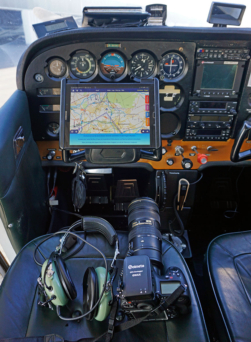 Zur Ausrüstung des Luftbildarchäologen Baoquan Song gehört u.a. eine Kamera mit GPS, so dass bei jedem Foto Position und Richtung gespeichert werden. So können auch nach langen Flügen die Bilder einzelnen Fundstellen problemlos zugeornet werden